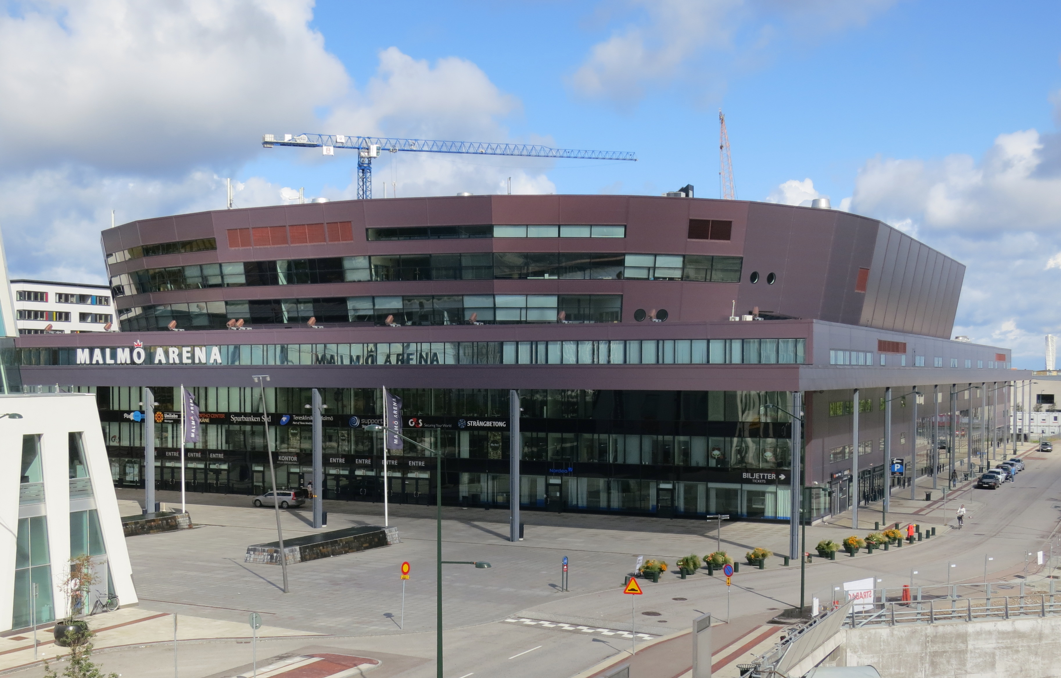 Malmö Arena i augusti 2014